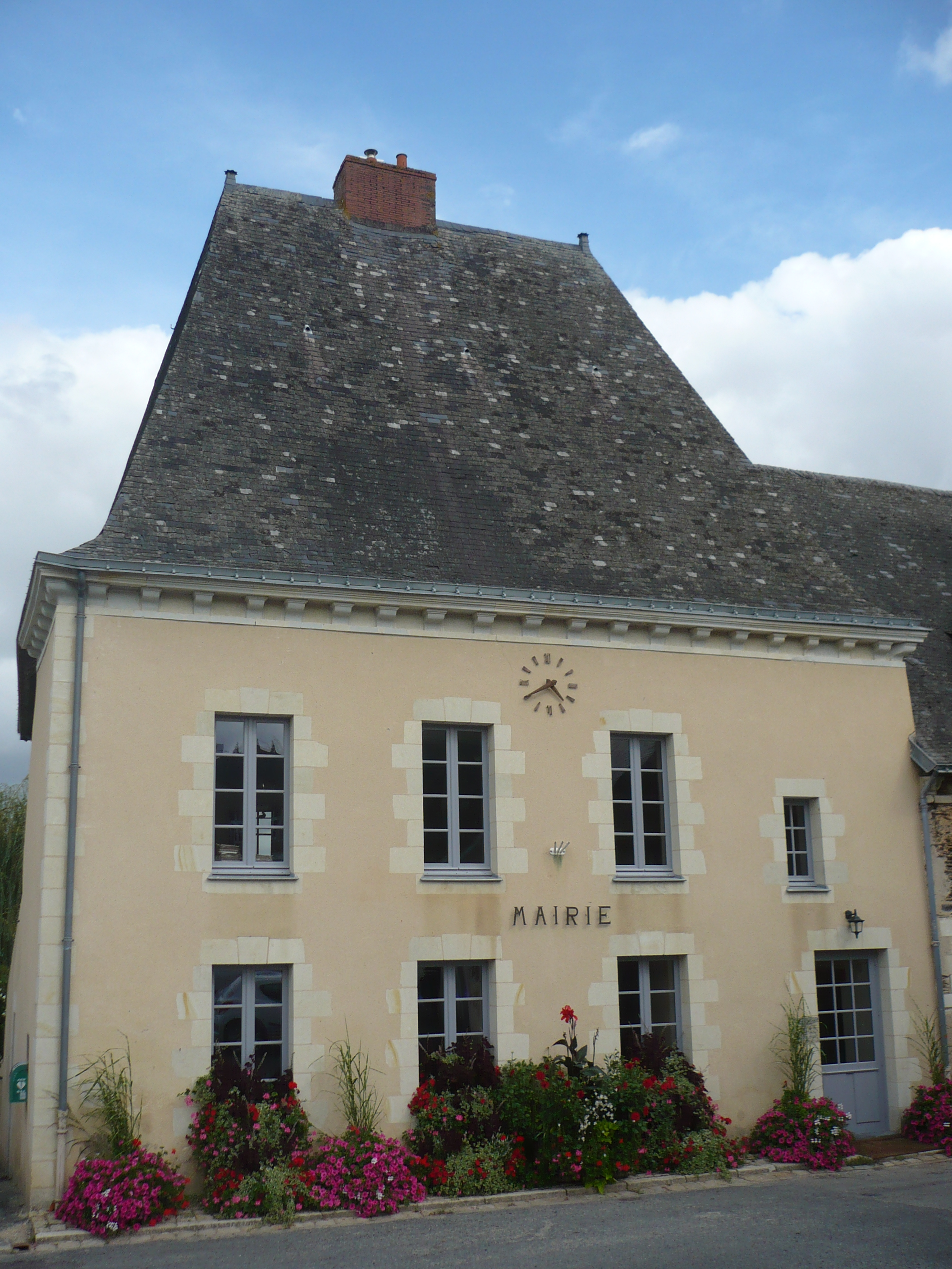 Nyoiseau - Mairie ancien batiment abbaye